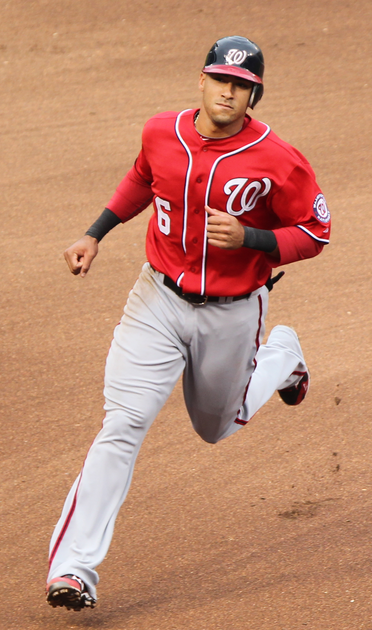 Ian Desmond